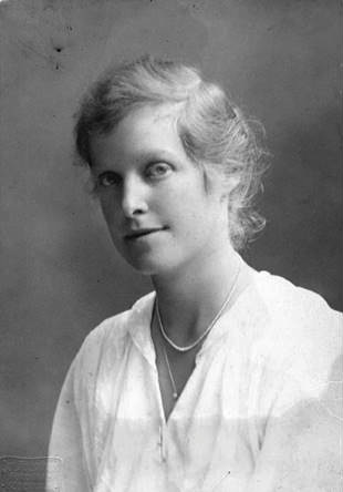 Fotografi